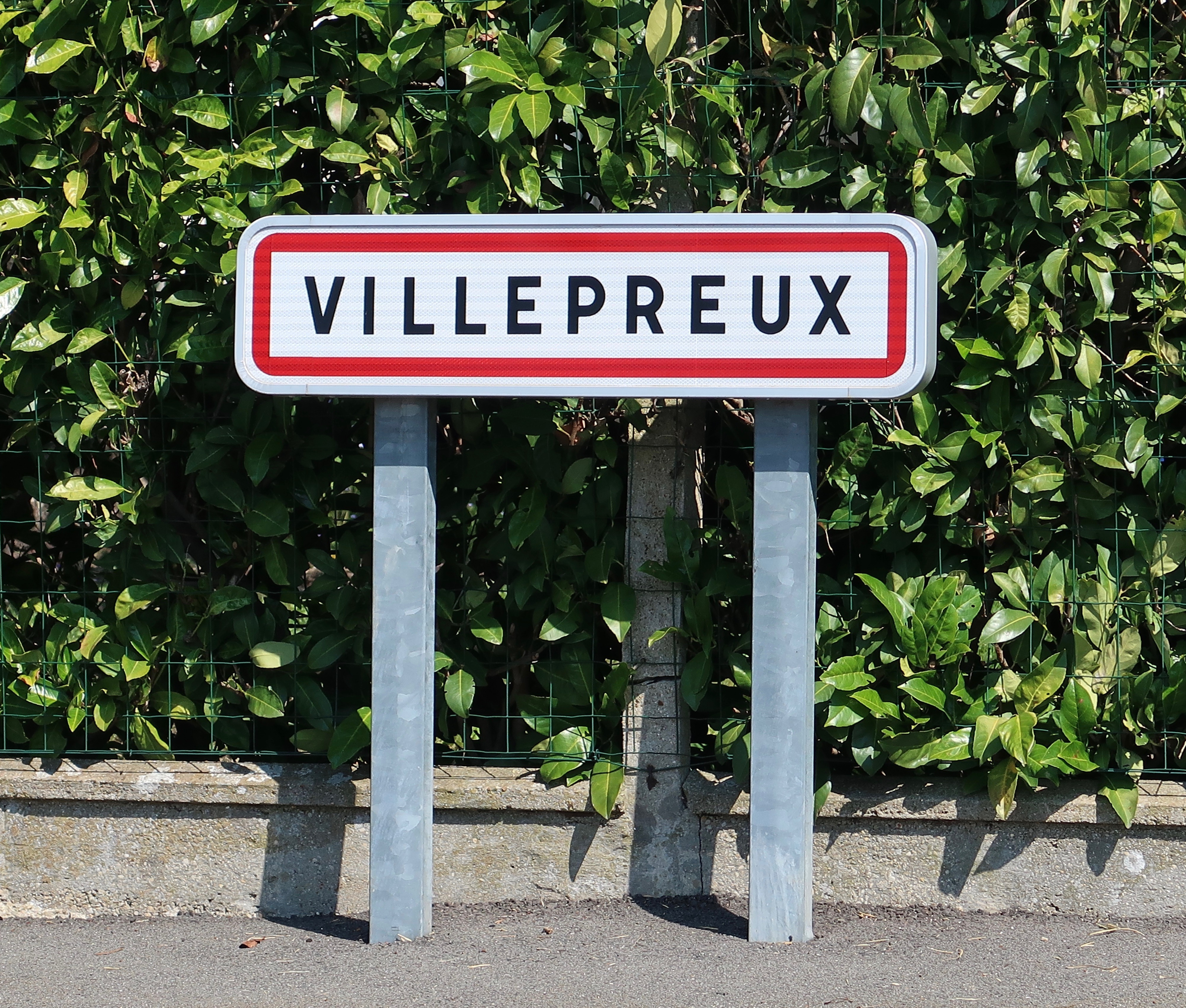 Plaque d'entrée à Villepreux (Yvelines), au croisement de l'avenue du Val-des-Clayes et de l'avenue du Ruisseau. Limite avec Les Clayes-sous-Bois.